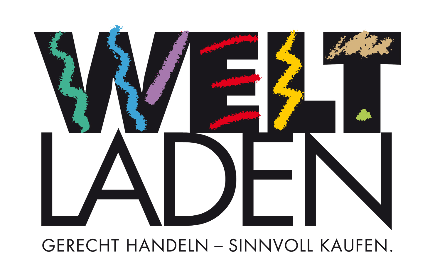 Weltlaeden Logo NEU